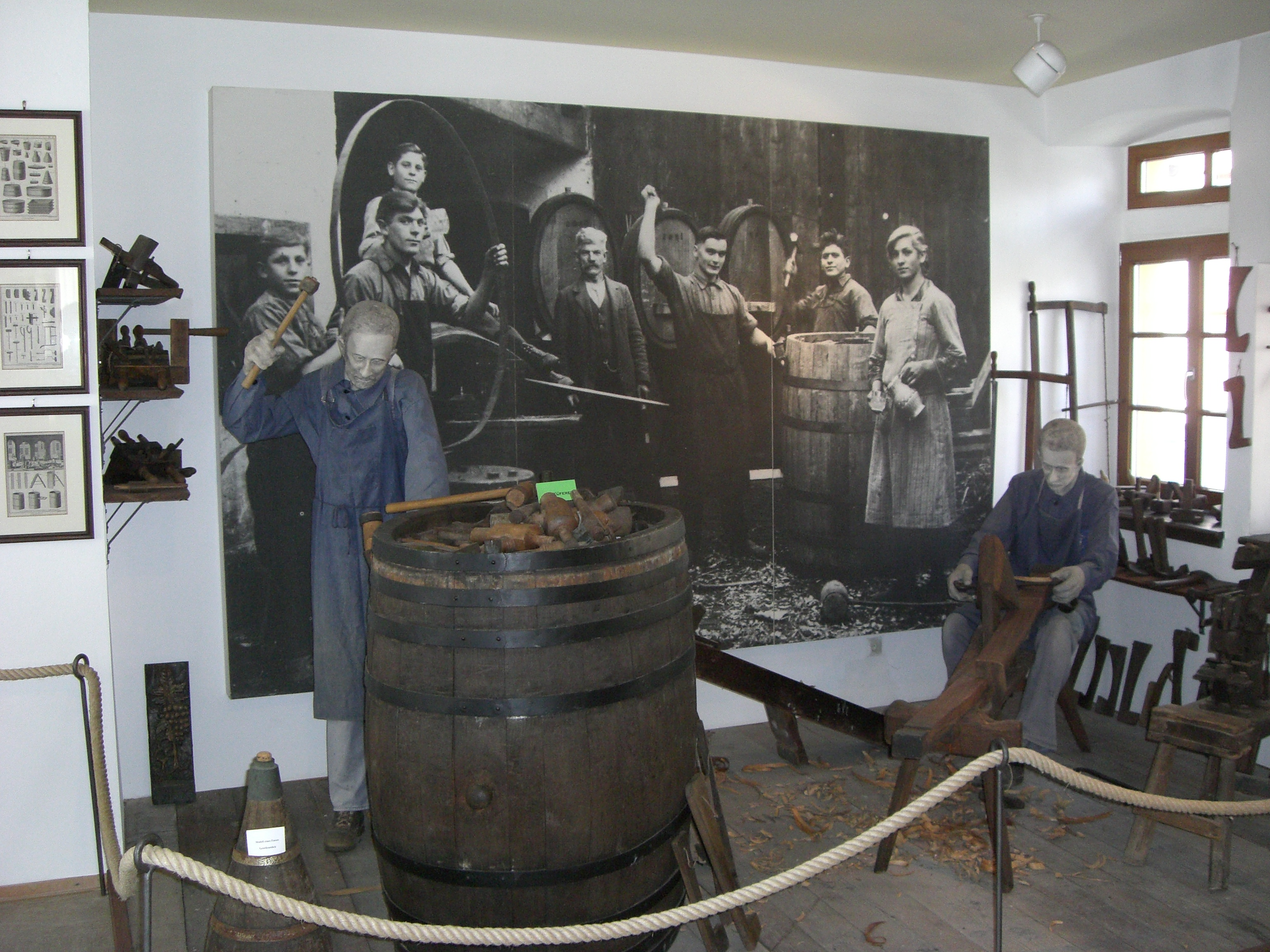 Historische Küfer bei der Arbeit; Exponat des Museums für Weinkultur in historischen Rathaus in Deidesheim.